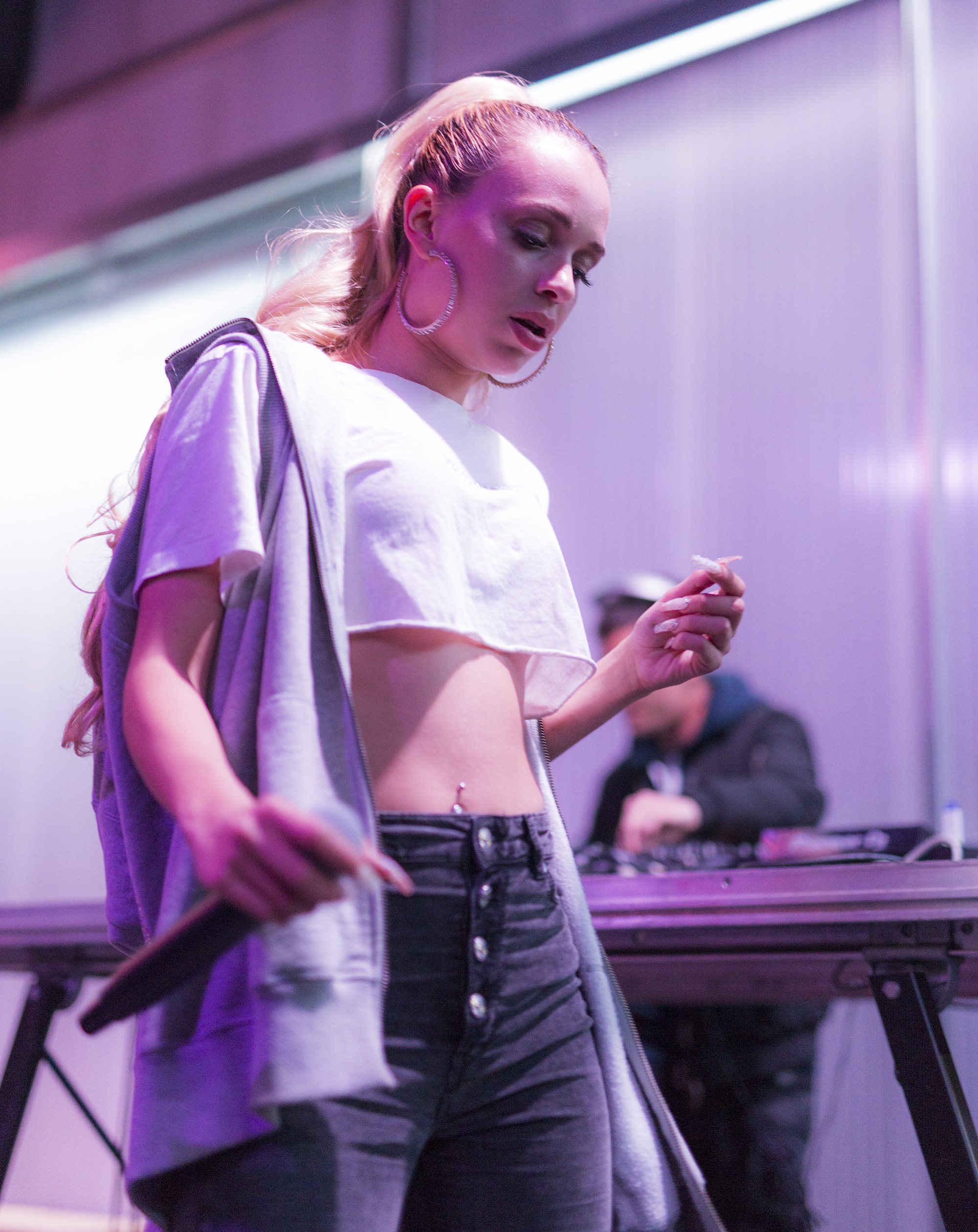 Artista: Bad Gyal Autora: Alba Ruperez para El Bloque TV Detalles: Sala Apolo, Barcelona. Febrero 2018